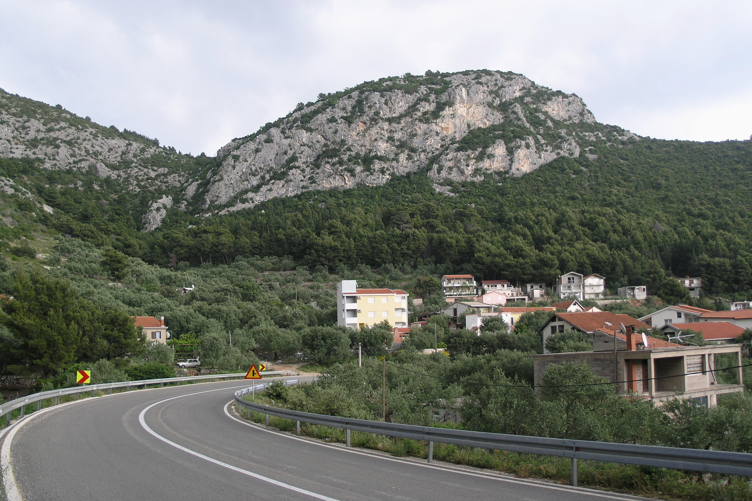 Přístavní město Klek, severozápadní okraj